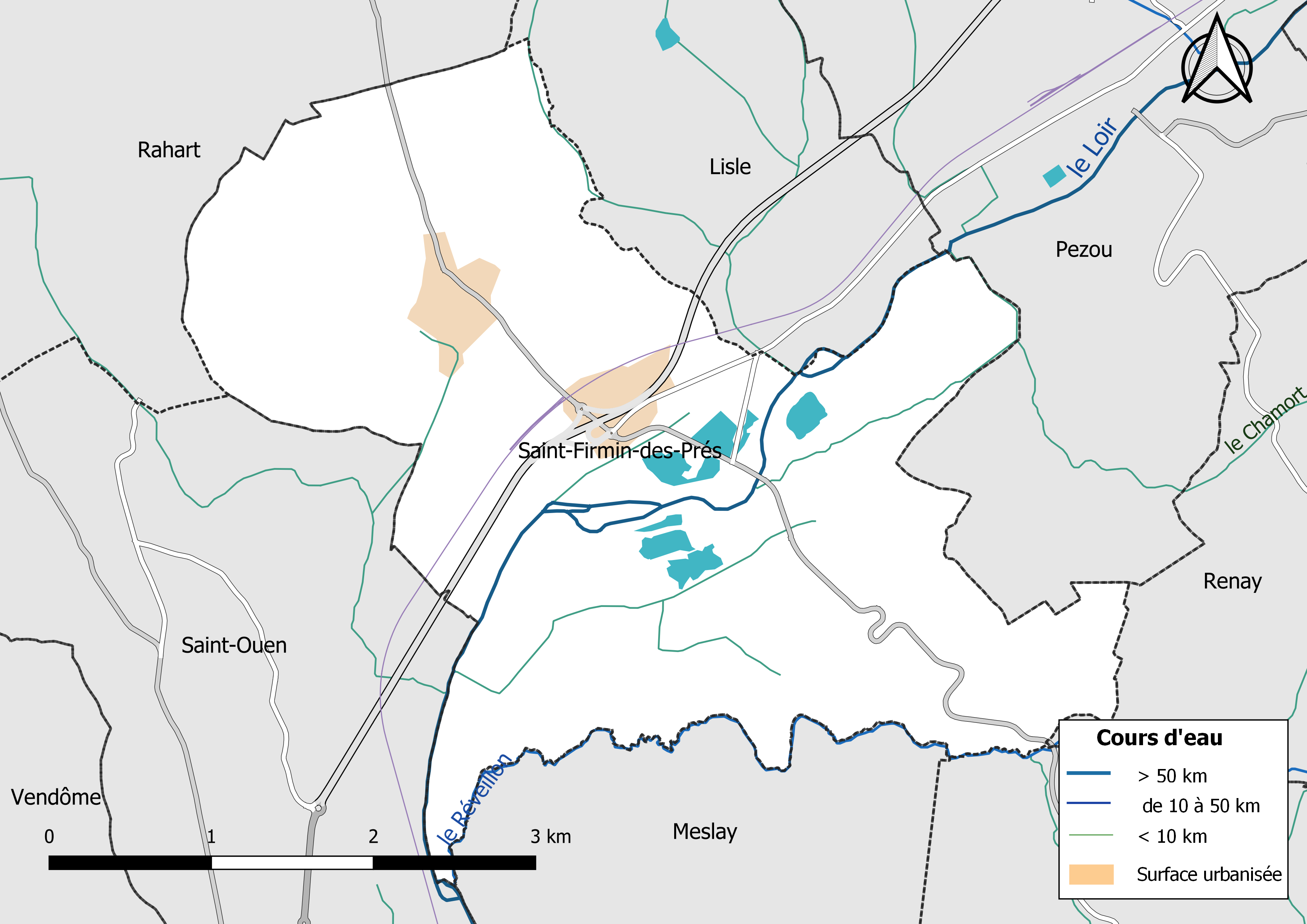 Carte du réseau hydrographique de la commune de Saint-Firmin-des-Prés (Loir-et-Cher, France).